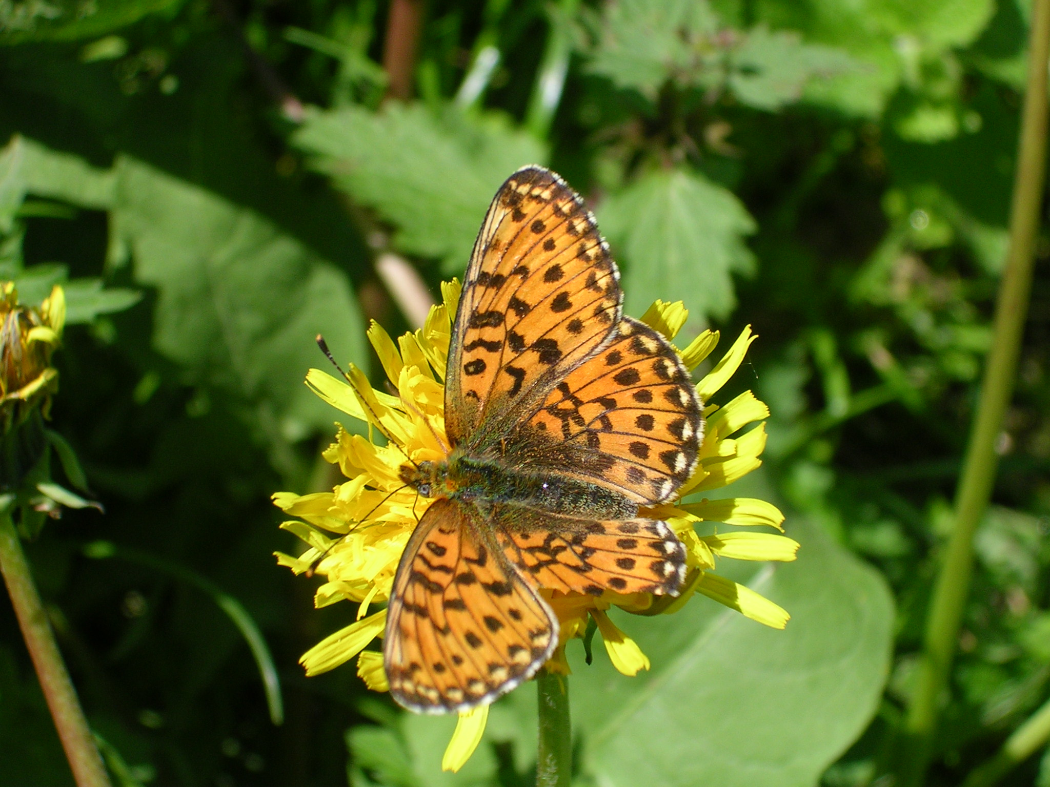 Veilchen-Perlmuttfalter (Boloria euphrosyne) bei Burg Kreuzenstein